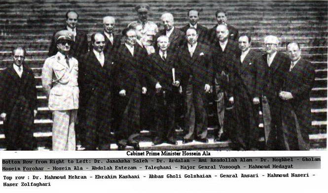 Cabinet Prime Minister Hossein Ala, Iran